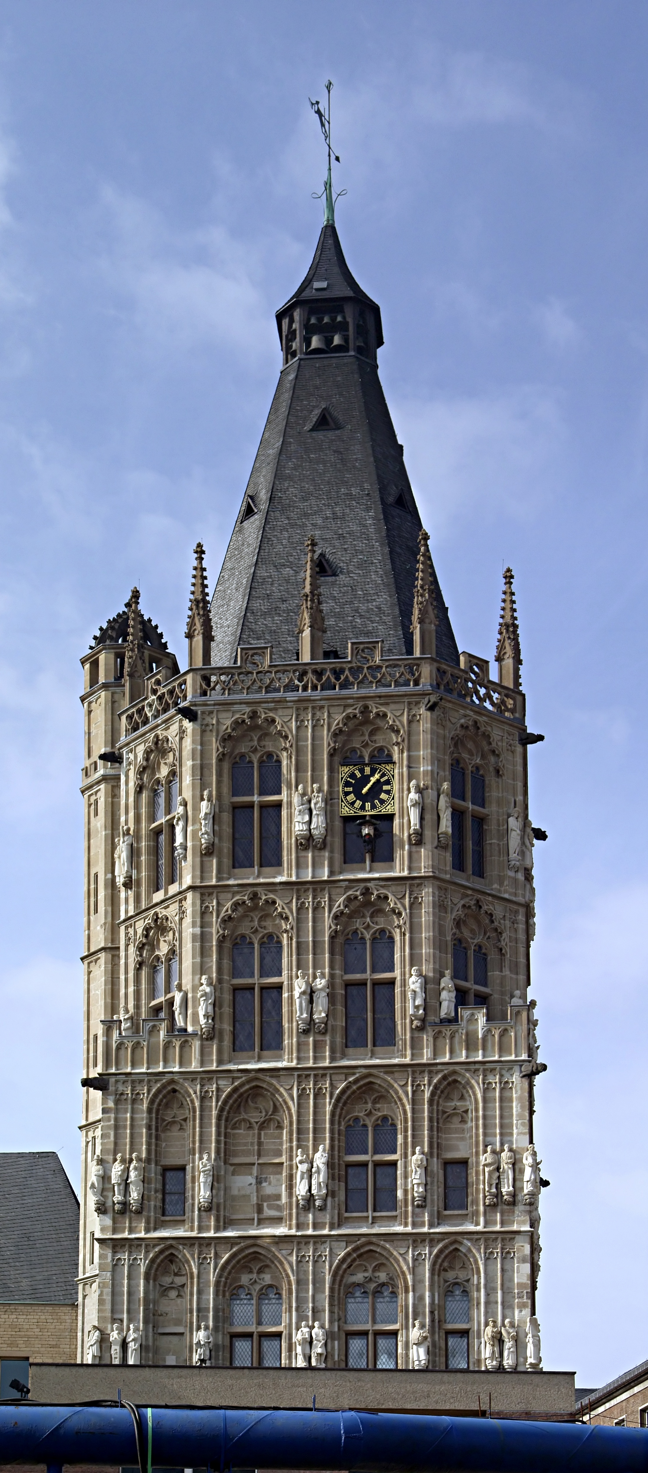 Rathausturm des Kölner Rathauses, Ostseite, mit den neuen Figuren